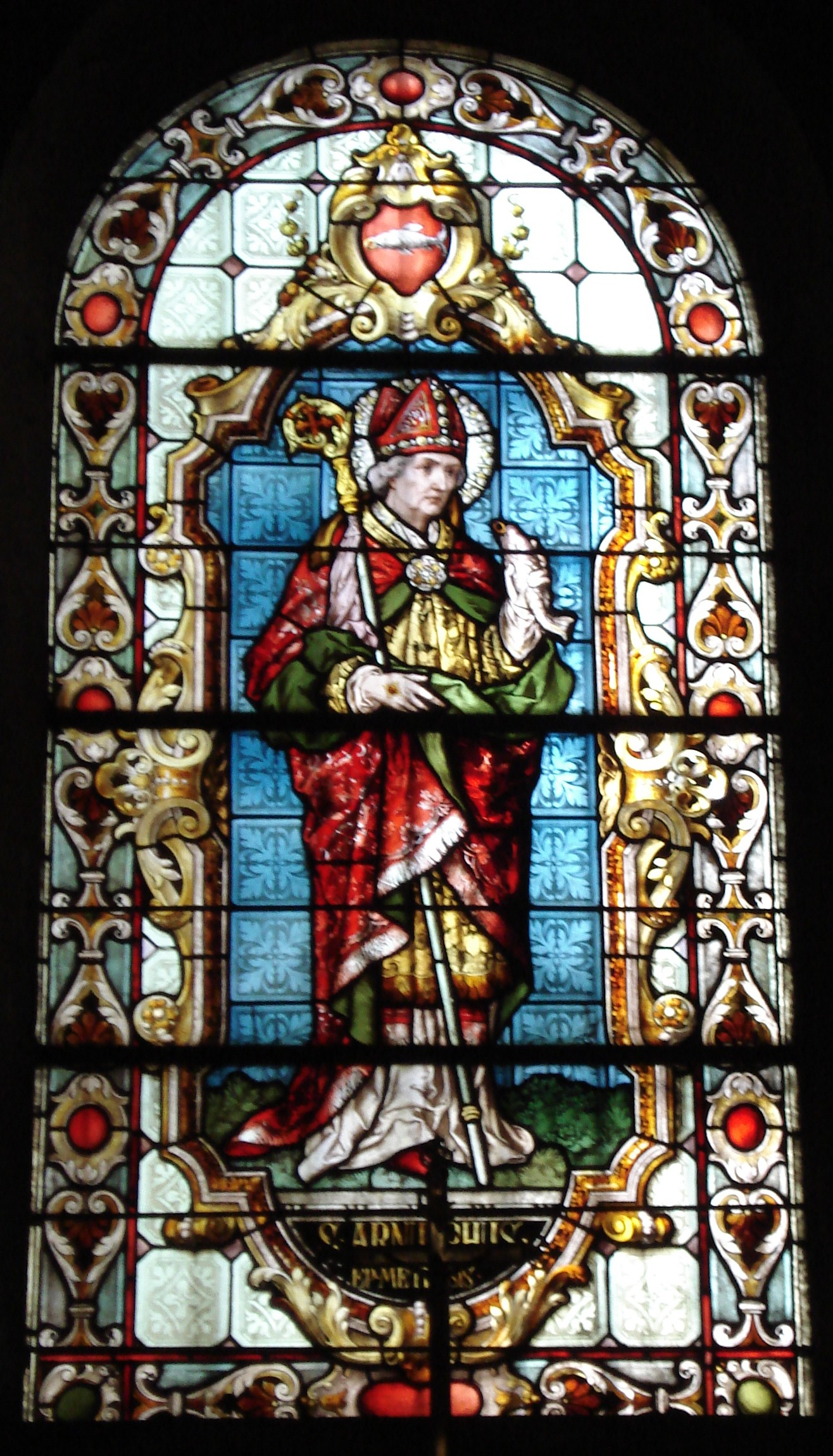 Vitrail représentant saint Arnould, chapelle Sainte-Glossinde